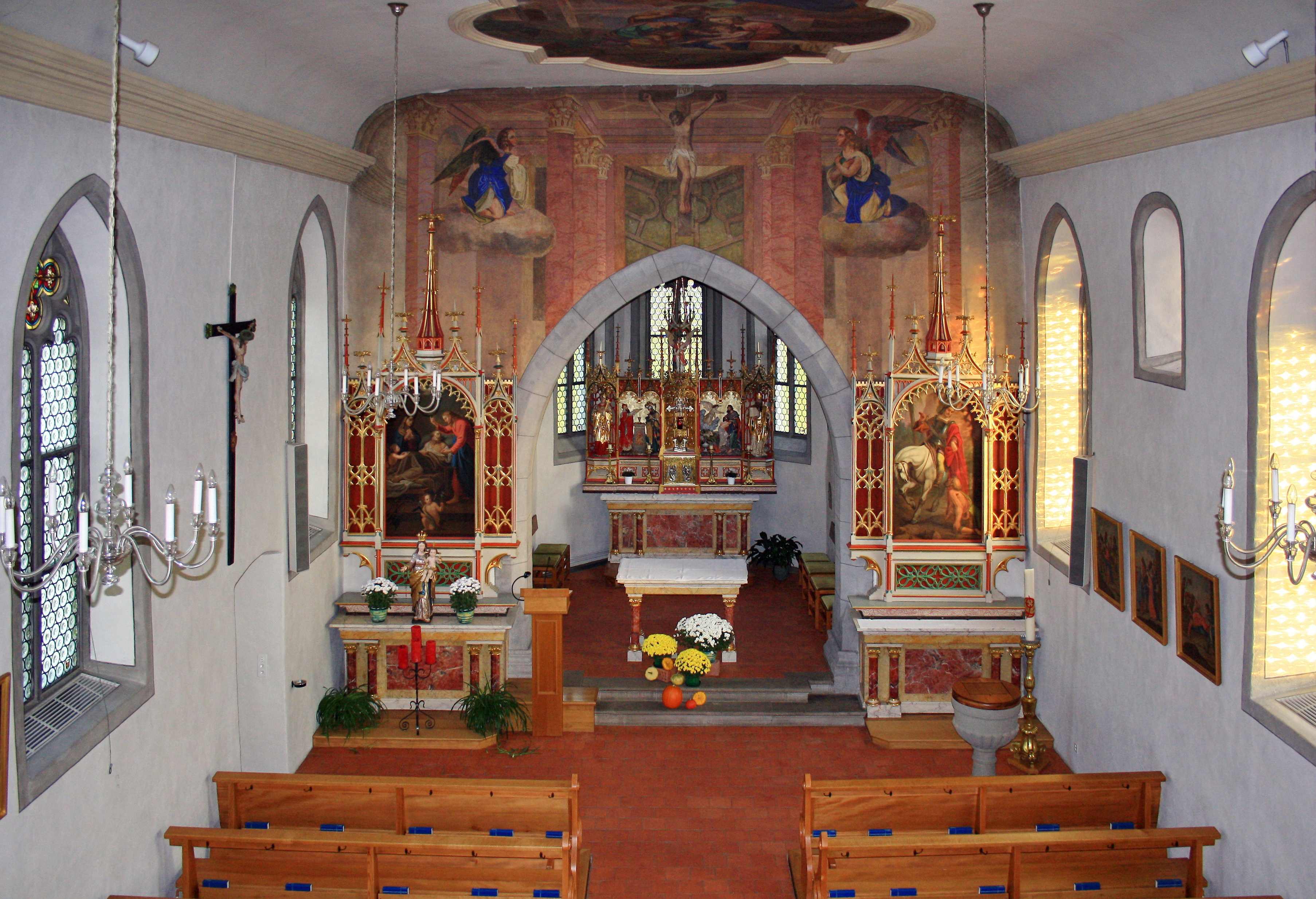 St. Martin Busskirch in Jona (SG) on upper Lake Zürich shore